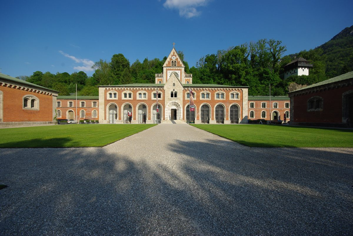 Alte SalineThis is a photograph of an architectural monument.